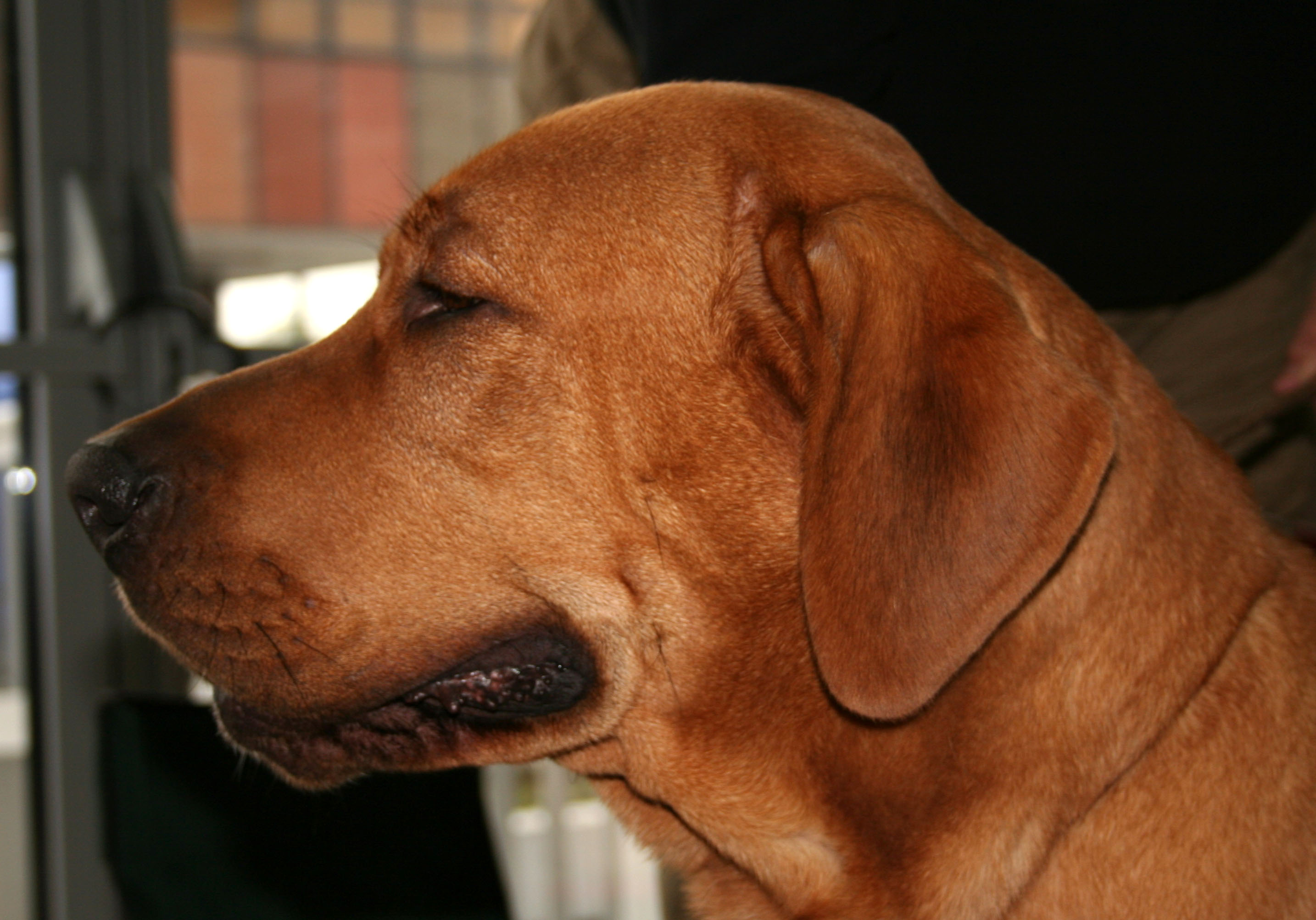 Broholmer na Światowej Wystawie Psów Rasowych w Poznaniu